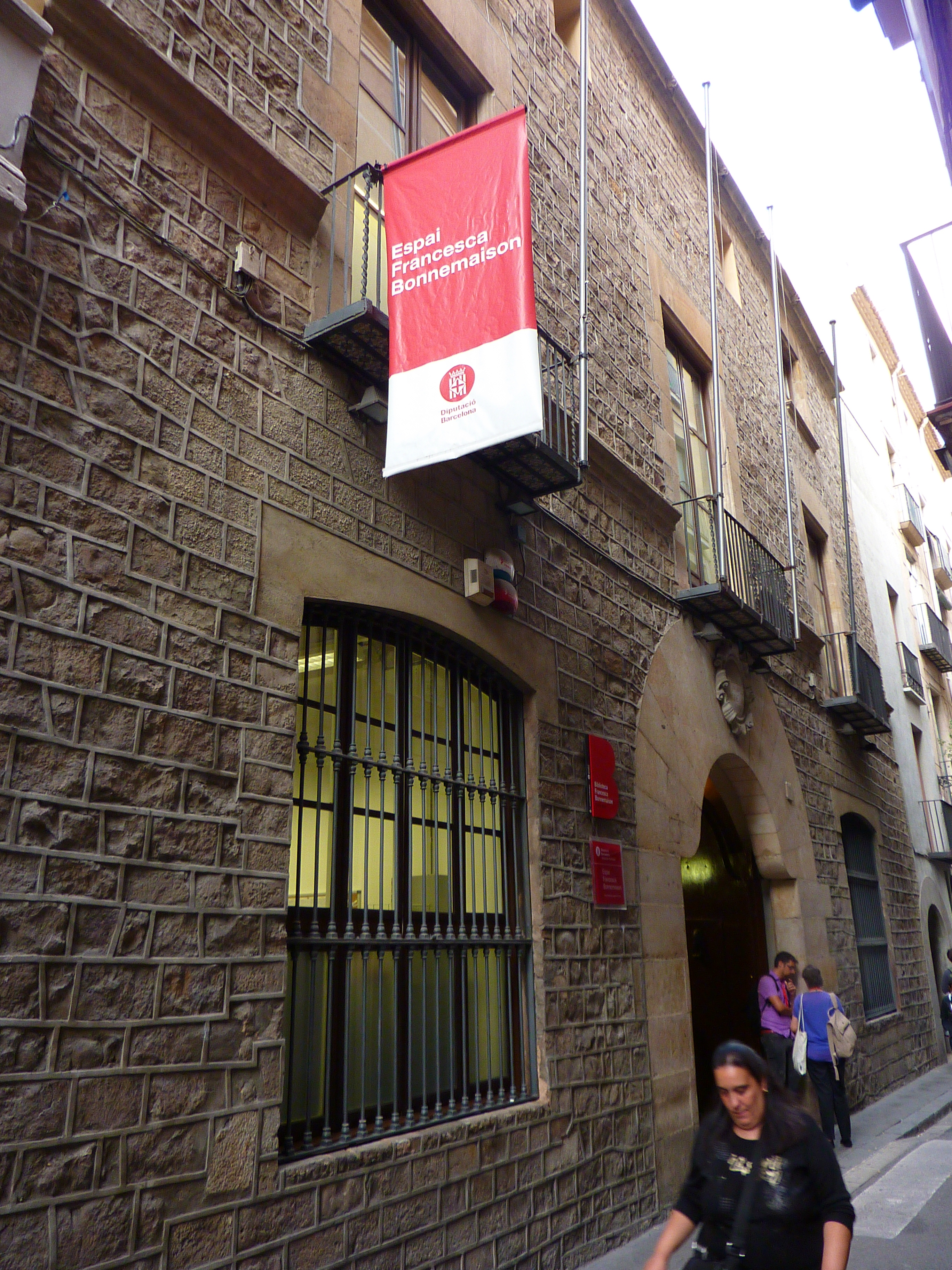 Institut de Cultura i Biblioteca Popular per a la Dona (Barcelona)